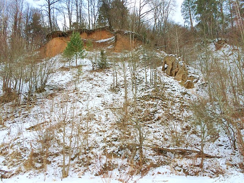 Verknės skardžiai ir Ožkų pečius